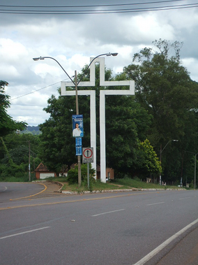 Caacupé. Paraguay. Cruz del peregrino